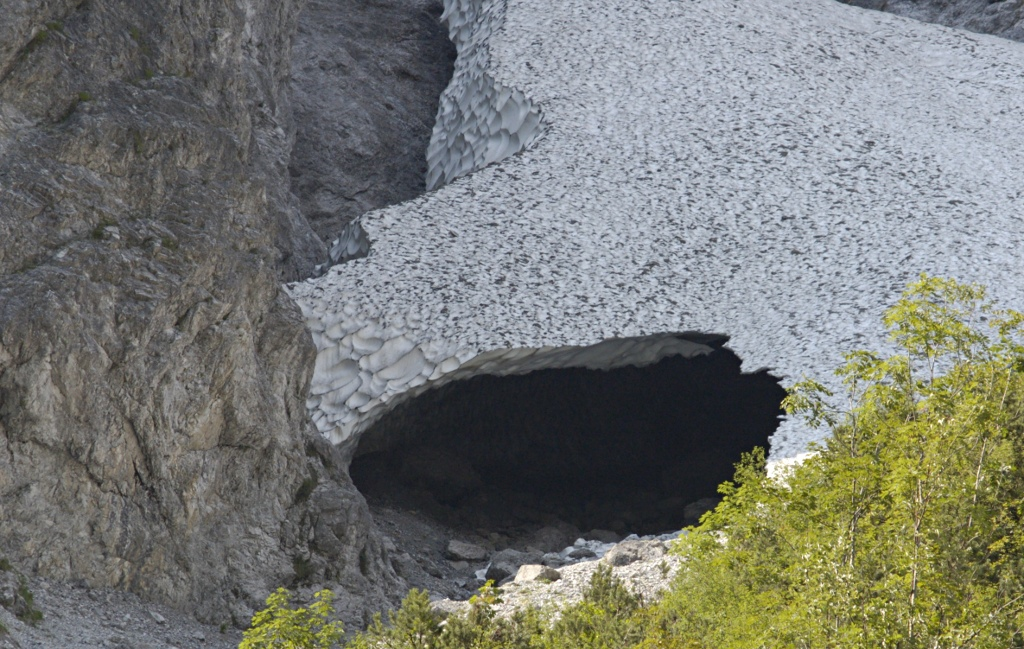 Das torartige Gewölbe der Eiskapelle an der Watzmann-Ostwand, aufgenommen im Sommer vom Fußweg nach St.Bartholomä am Königssee